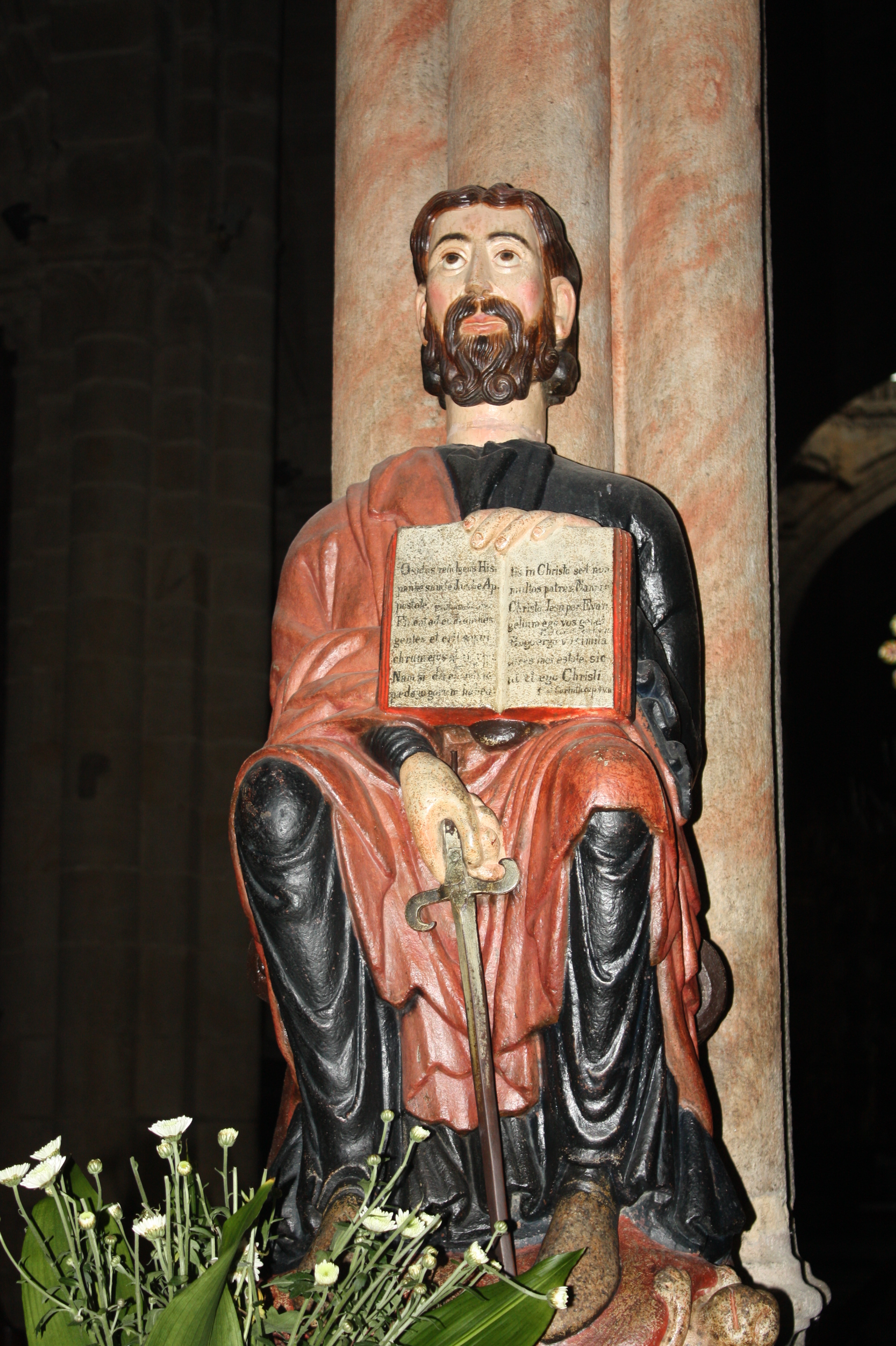 Estatua sedente de Santiago Apóstolo no parteluz do Pórtico do Paraíso, na Catedral de Ourense.